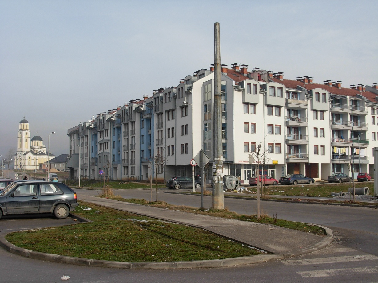 Stambeni blok u naselju Dobrinja u Istočnom Sarajevu. U pozadini se vidi crkva Sv. Vasilija Ostroškog.